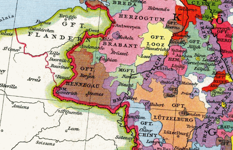 Grafschaft Hennegau um 1250